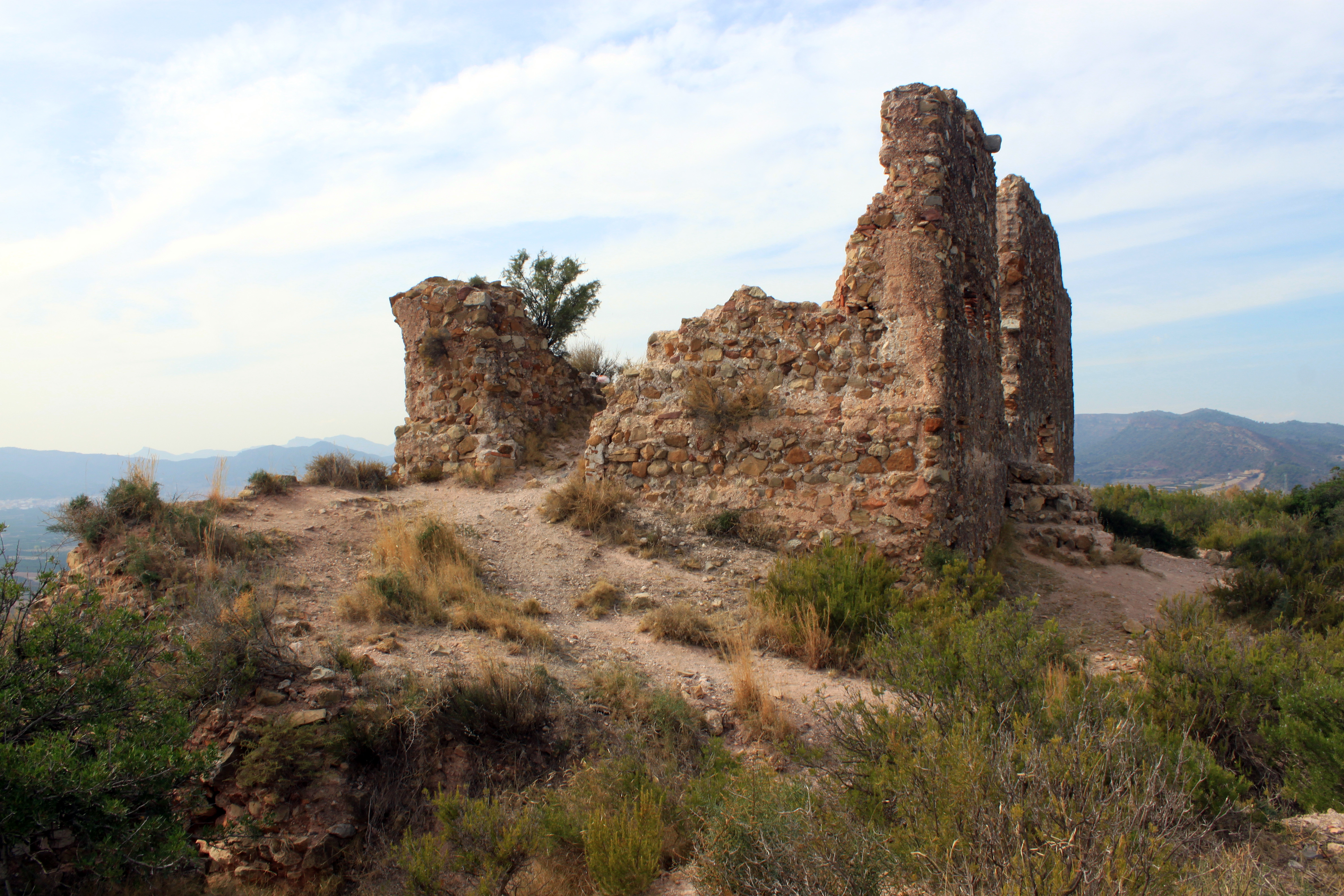 Castillo de Almenara, provincia de Castellón, Comunidad Valenciana. Se observan los restos del recinto edificado en época cristiana sobre las defensas árabes.